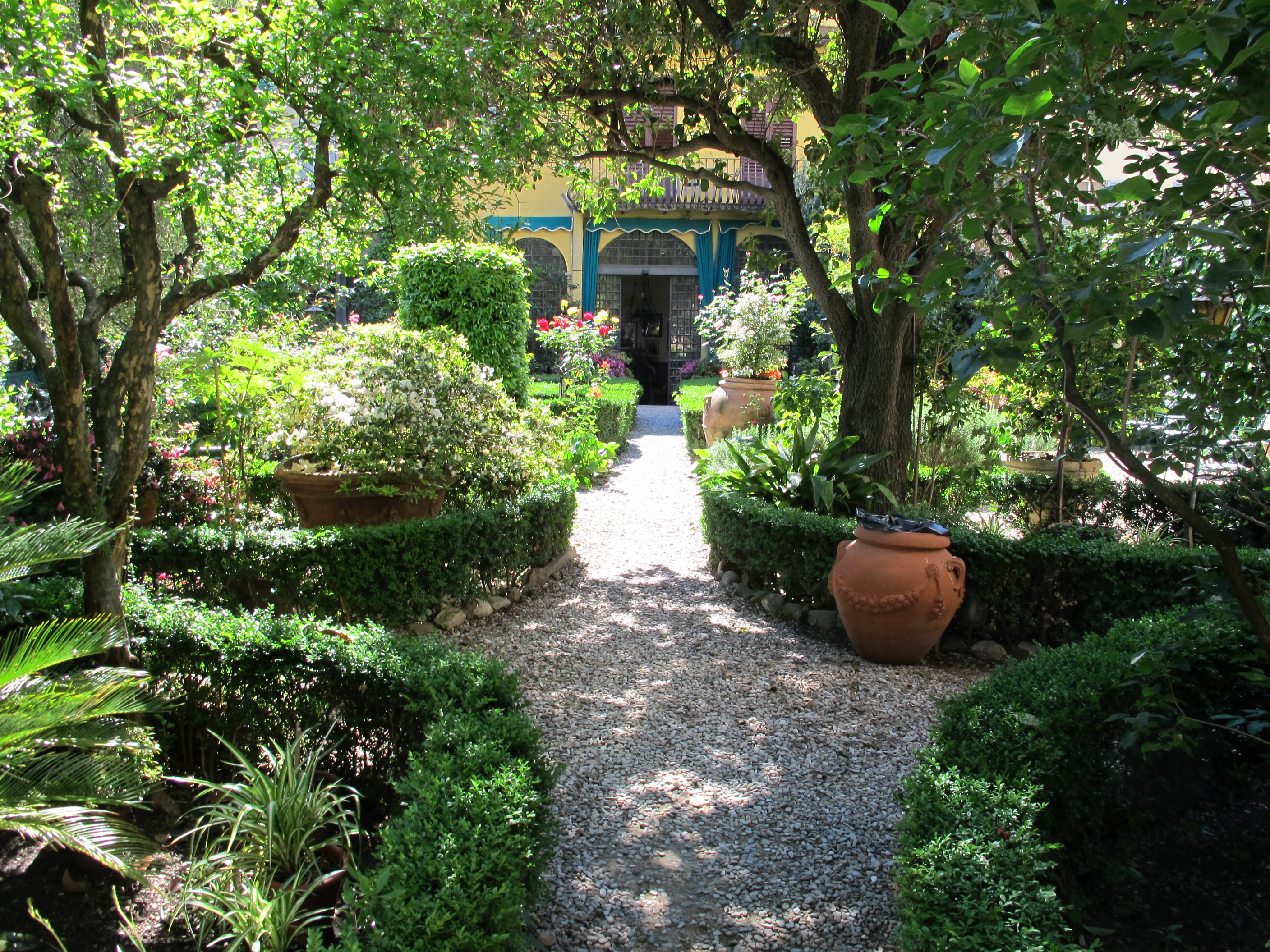 Palazzo Marzichi-Lenzi, giardino